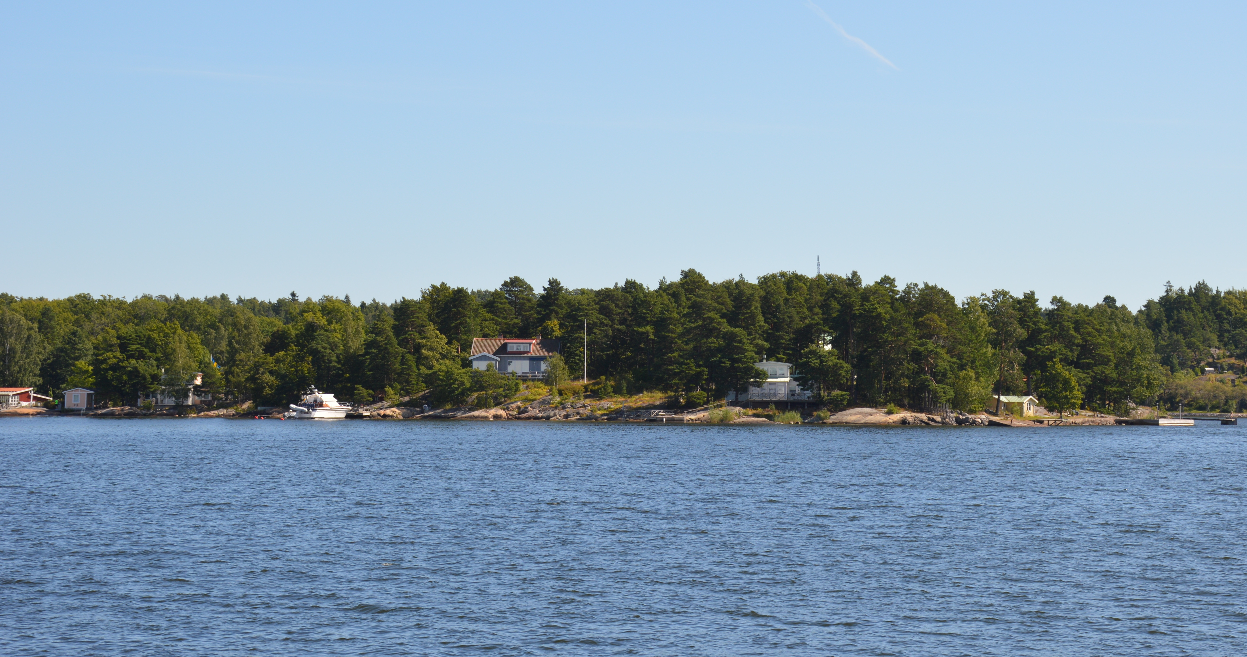 Stora Batsholmen